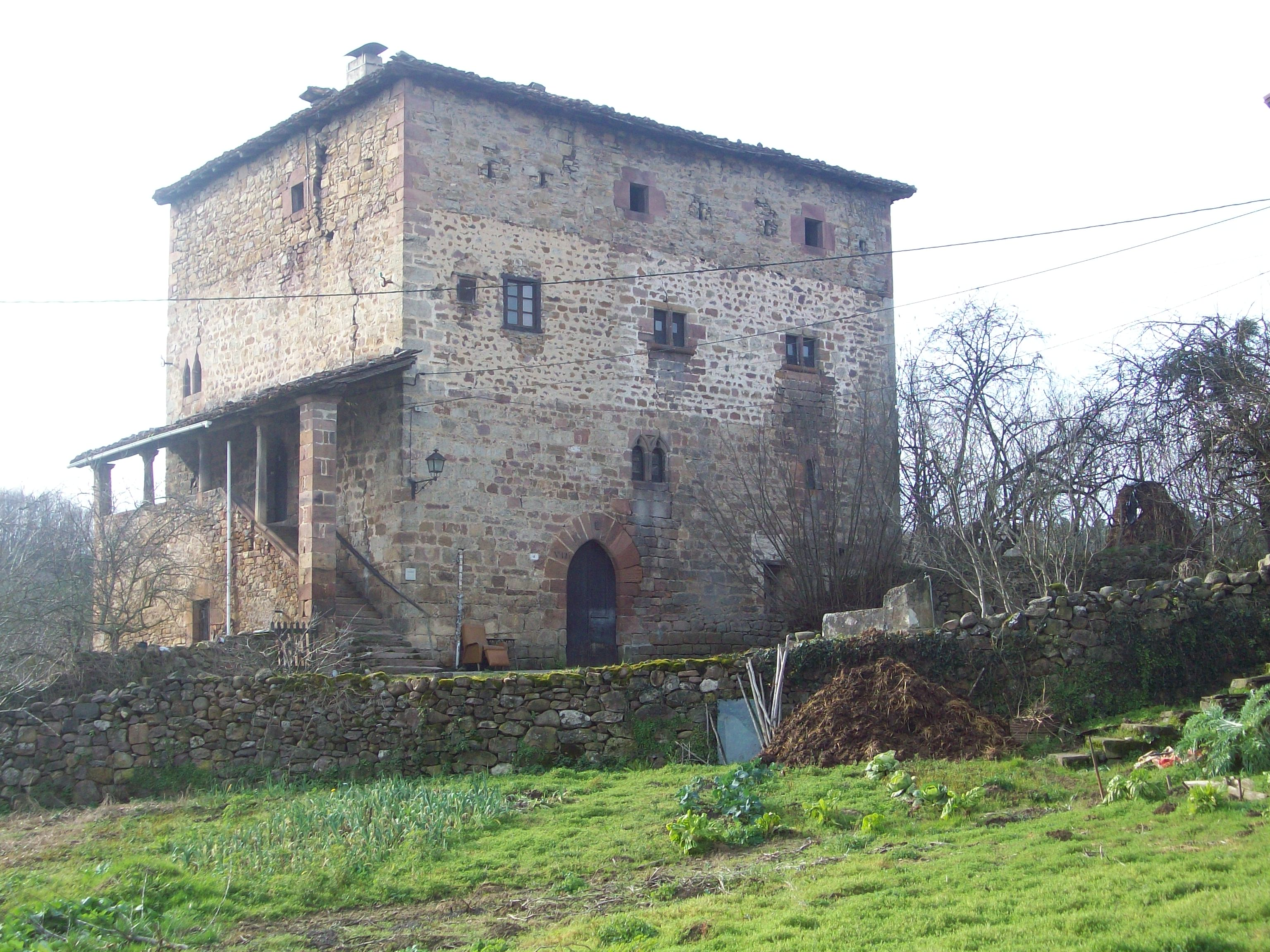 Baztango Irurita udalerrian dagoen Jauregizarrea edo Dorretxea dorrea. Nafarroa, Euskal Herria.